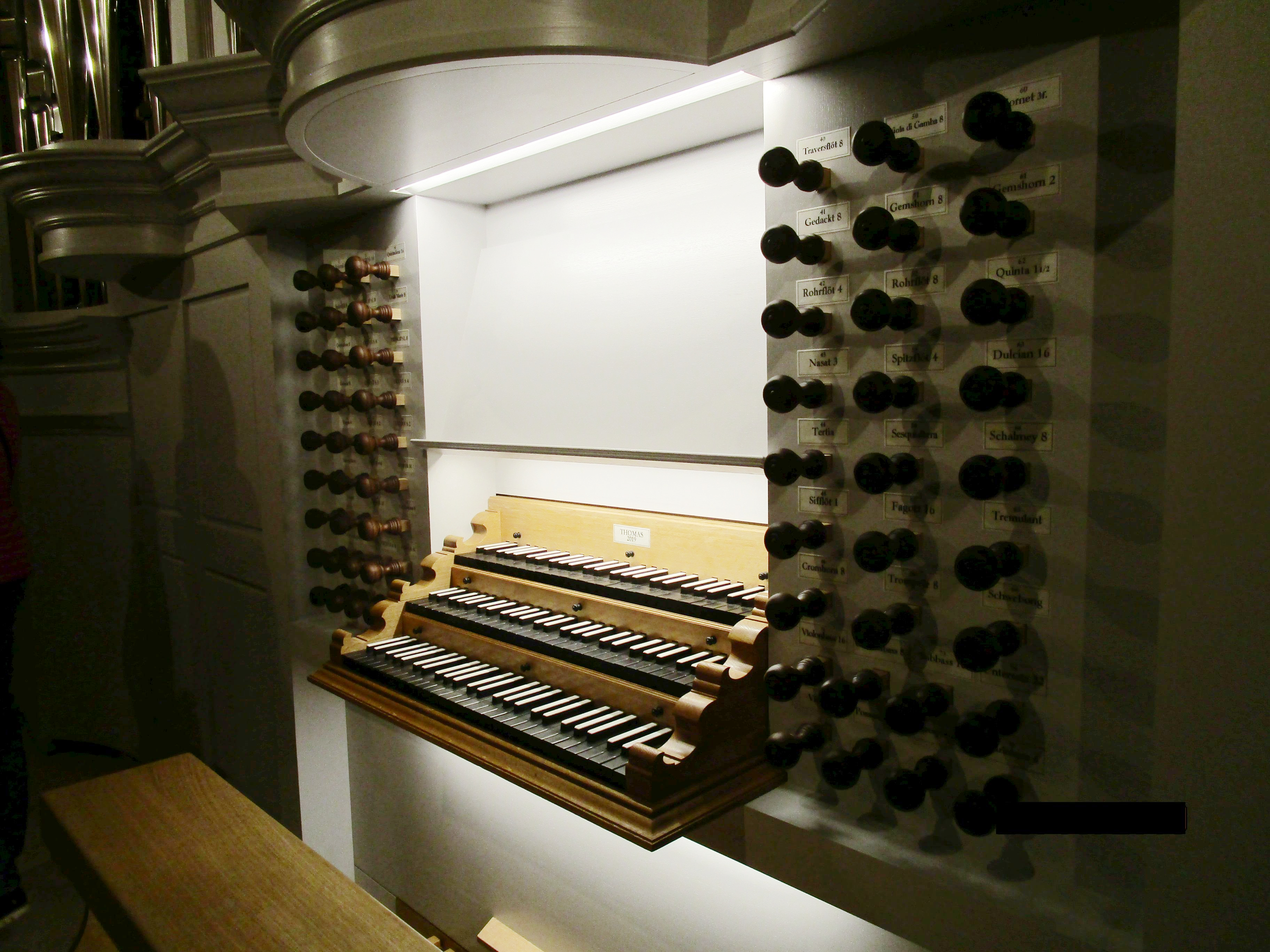 Die Neustädter Hof- und Stadtkirche St. Johannis bekam im Jahr 2019 zusätzlich zur Spanischen Orgel (s. auch Spanische Trompete) eine neue Orgel des belgischen Orgelbauers Dominique Thomas (siehe Orgeln der Neustädter Kirche (Hannover)), die im Eigentum des Landes Niedersachsen steht, denn sie ist ein von Bund und Land je zur Hälfte finanziertes Instrument zur Ausbildung von Studentinnen und Studenten des Studiengangs Kirchenmusik der Hochschule für Musik, Theater und Medien Hannover. Nach dem zwischen Land Niedersachsen und Kirchengemeinde geschlossenen Vertrag steht die Orgel der Musikhochschule 40 Stunden in der Woche für die Ausbildung der Studierenden zur Verfügung. Die neue Orgel wurde am 26. Oktober 2019 von Orgelprofessor Emmanuel Le Divellec (Musikhochschule Hannover) mit einem reinen Programm von Orgelmusik von Johann Sebastian Bach der Öffentlichkeit vorgestellt.